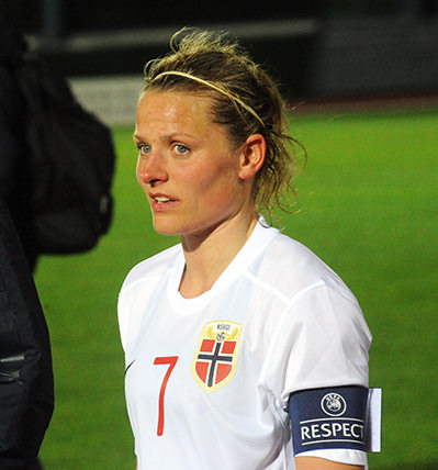 Trine Rønning, 2015 Algarve Cup